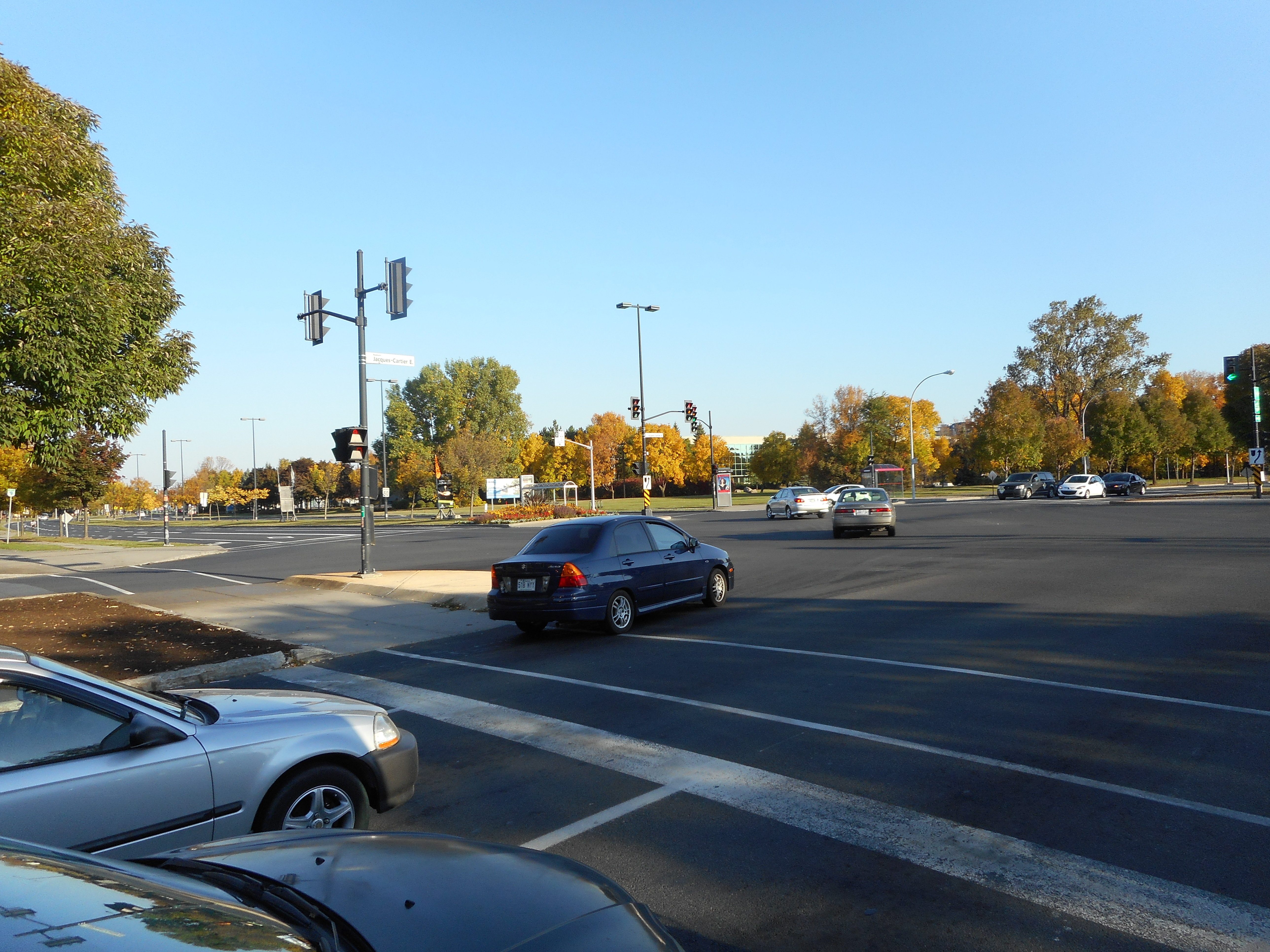 Boulevard Jacques-Cartier Est, à l'intersection du boulevard Roland-Therrien, Longueuil On aperçoit au centre le palais de justice de Longueuil.